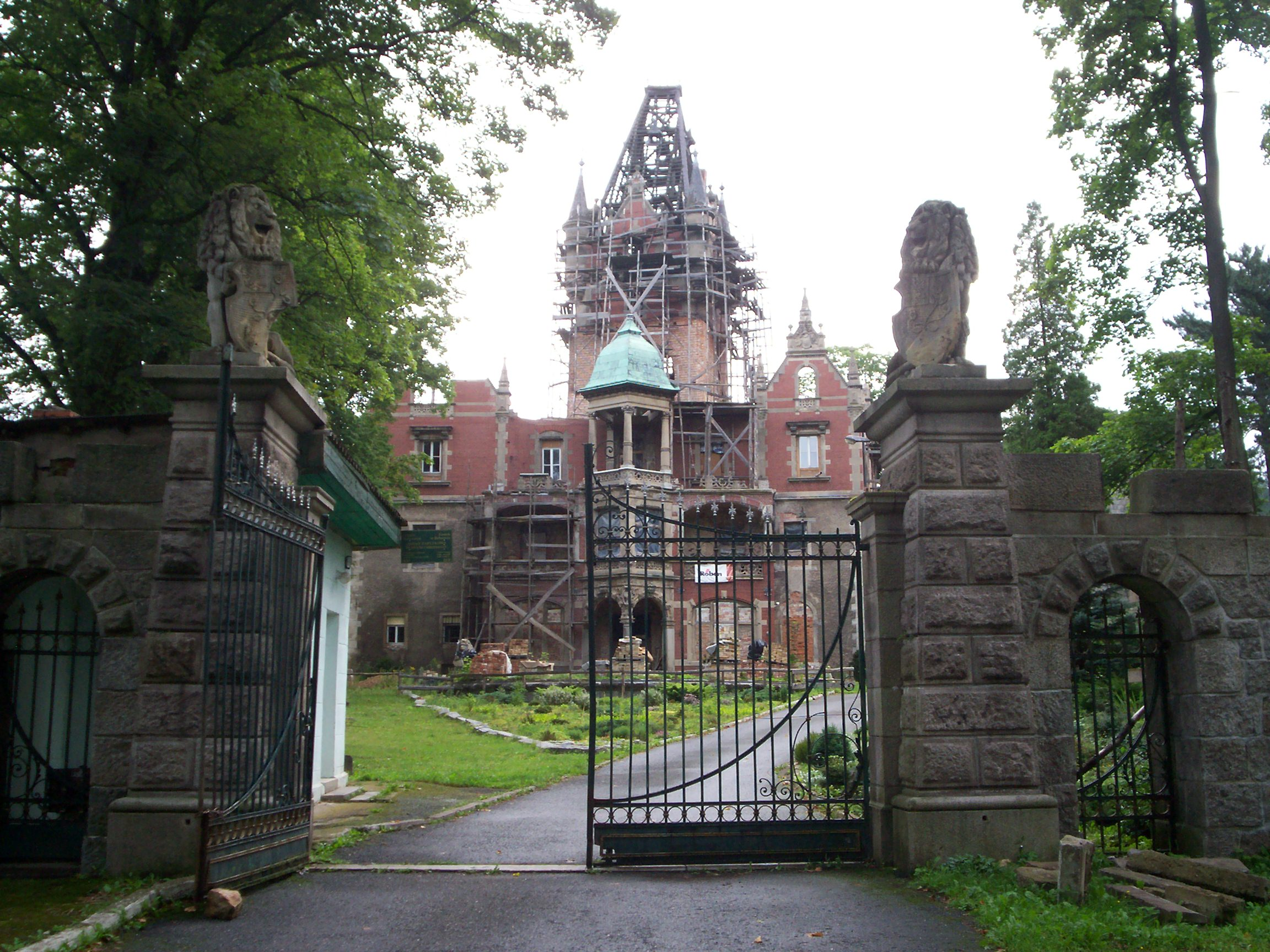 Bobrów, palaco.